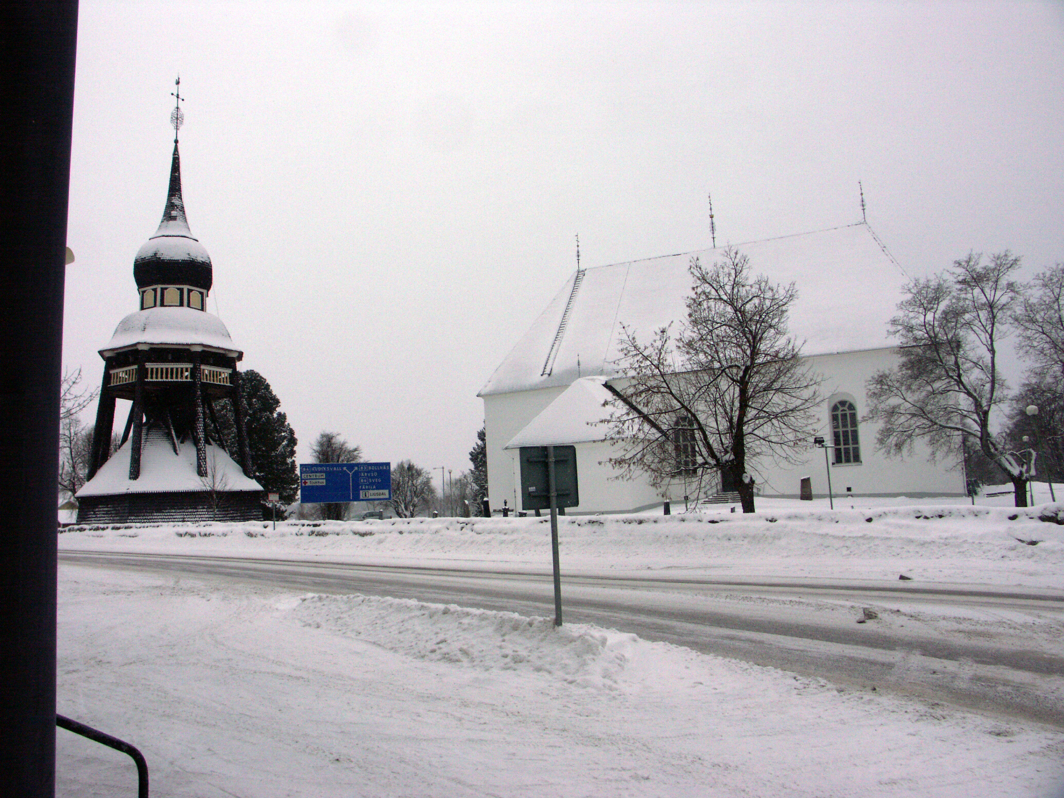 Ljusdals kyrka med klockstapel och Riksväg 83 i förgrunden.